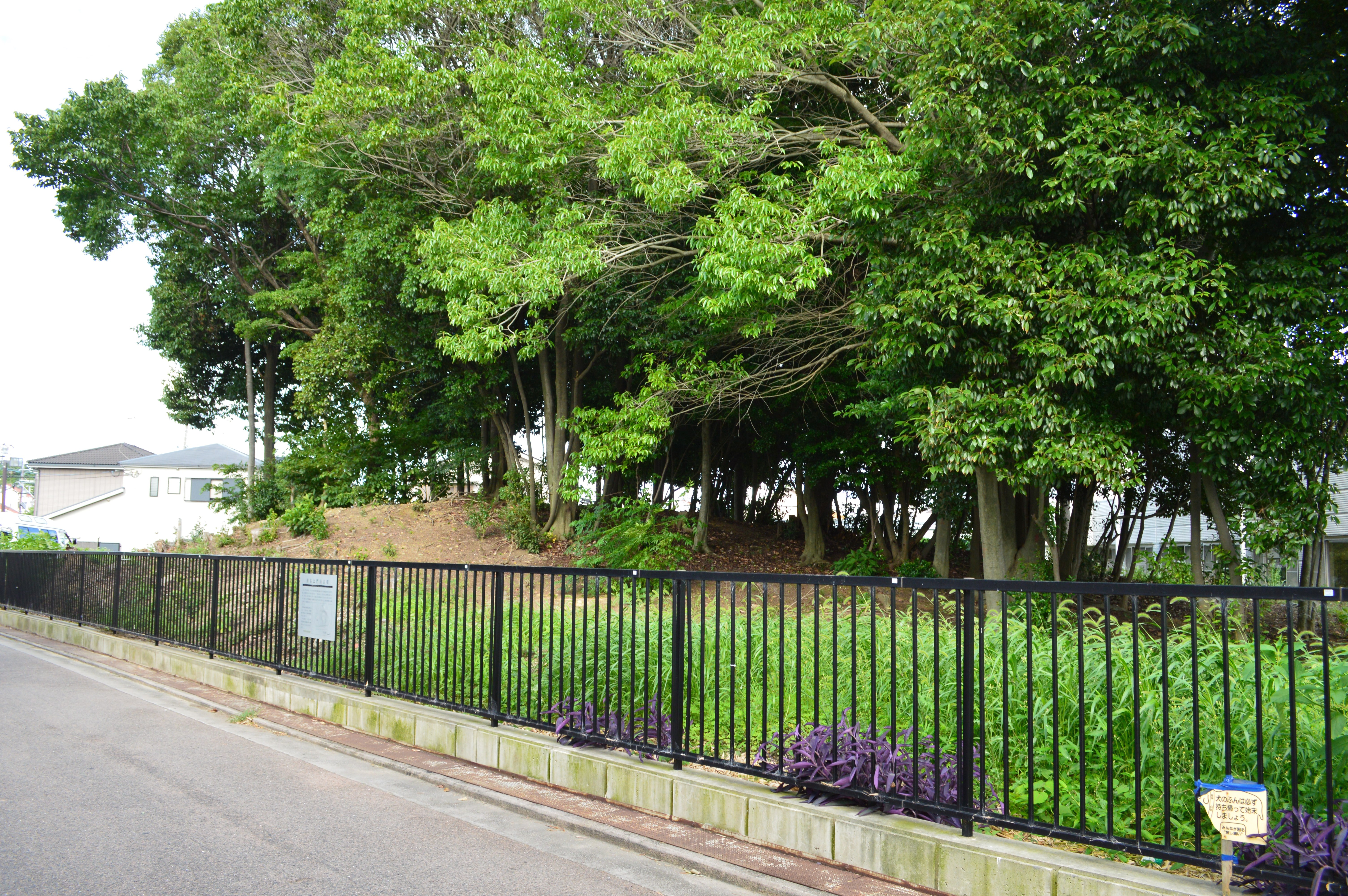 善右ヱ門山古墳 全景